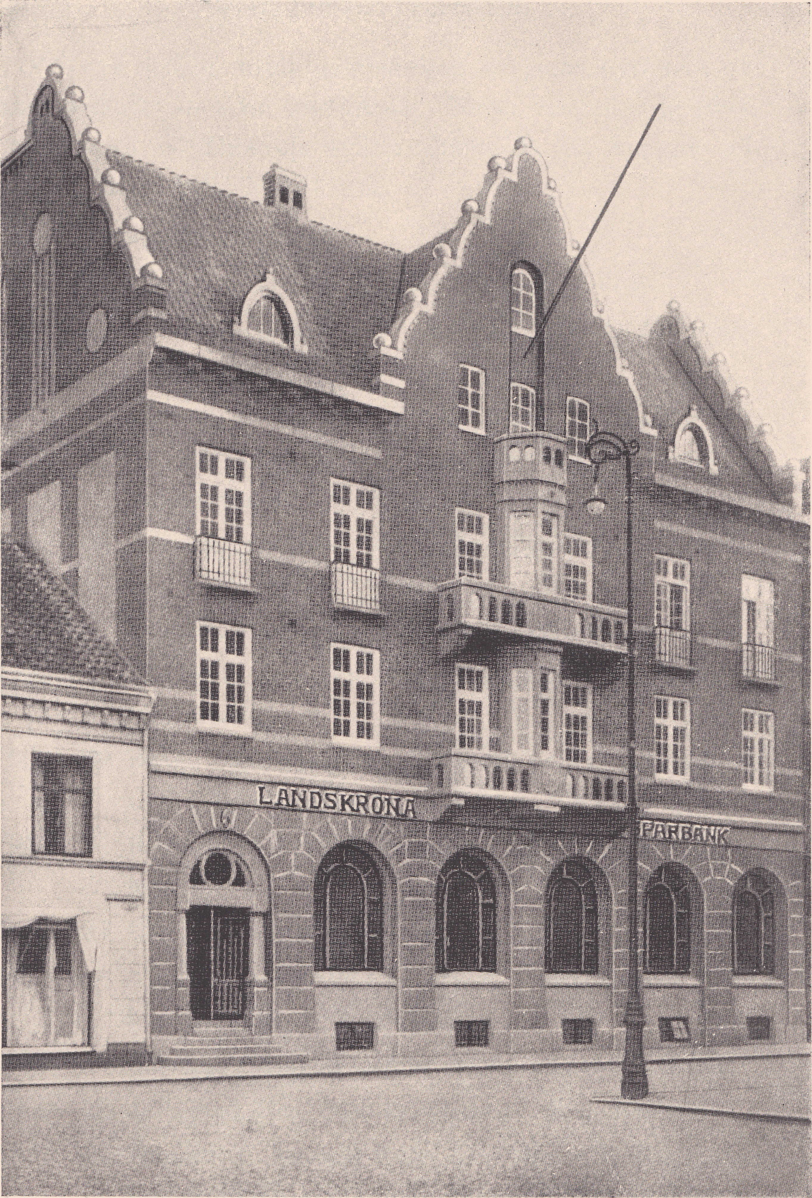 Sparbankens fastighet på Rådhustorget 9 i Landskrona.